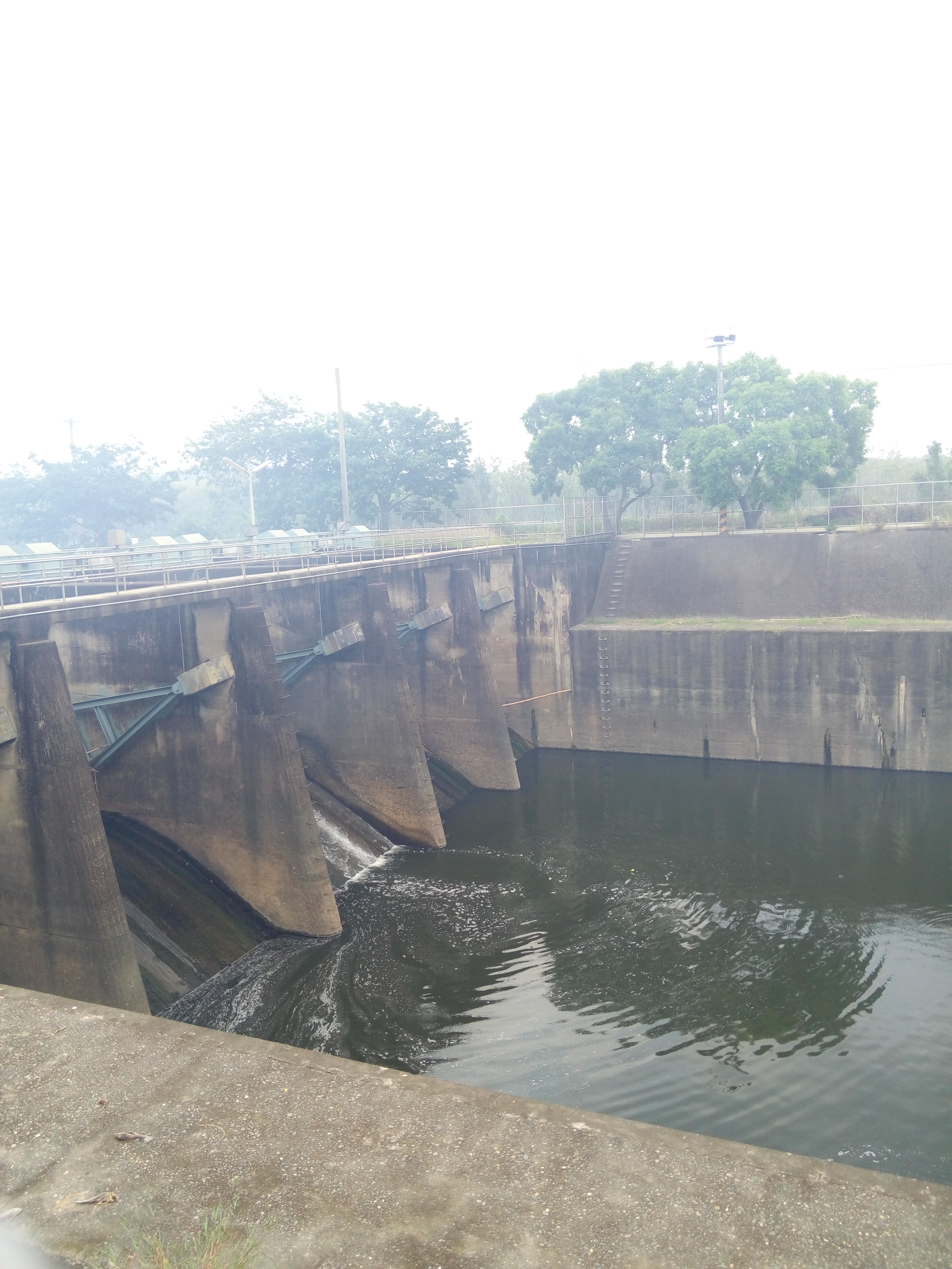 中文（台灣）: 臺灣臺南市柳營區德元埤水庫洩洪道